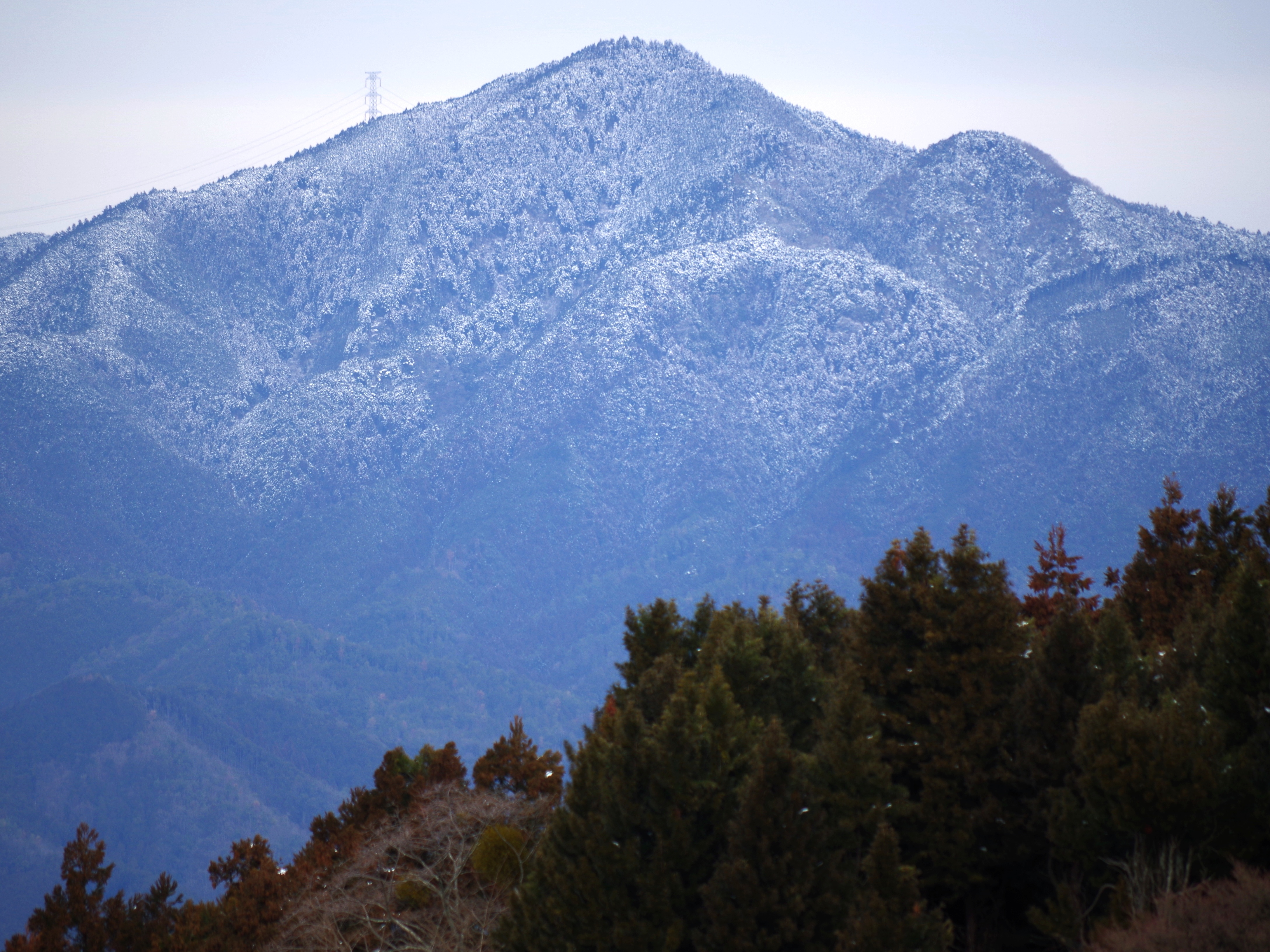 吉野山上千本から龍門岳を望む Ryūmongadake 2013.2.17